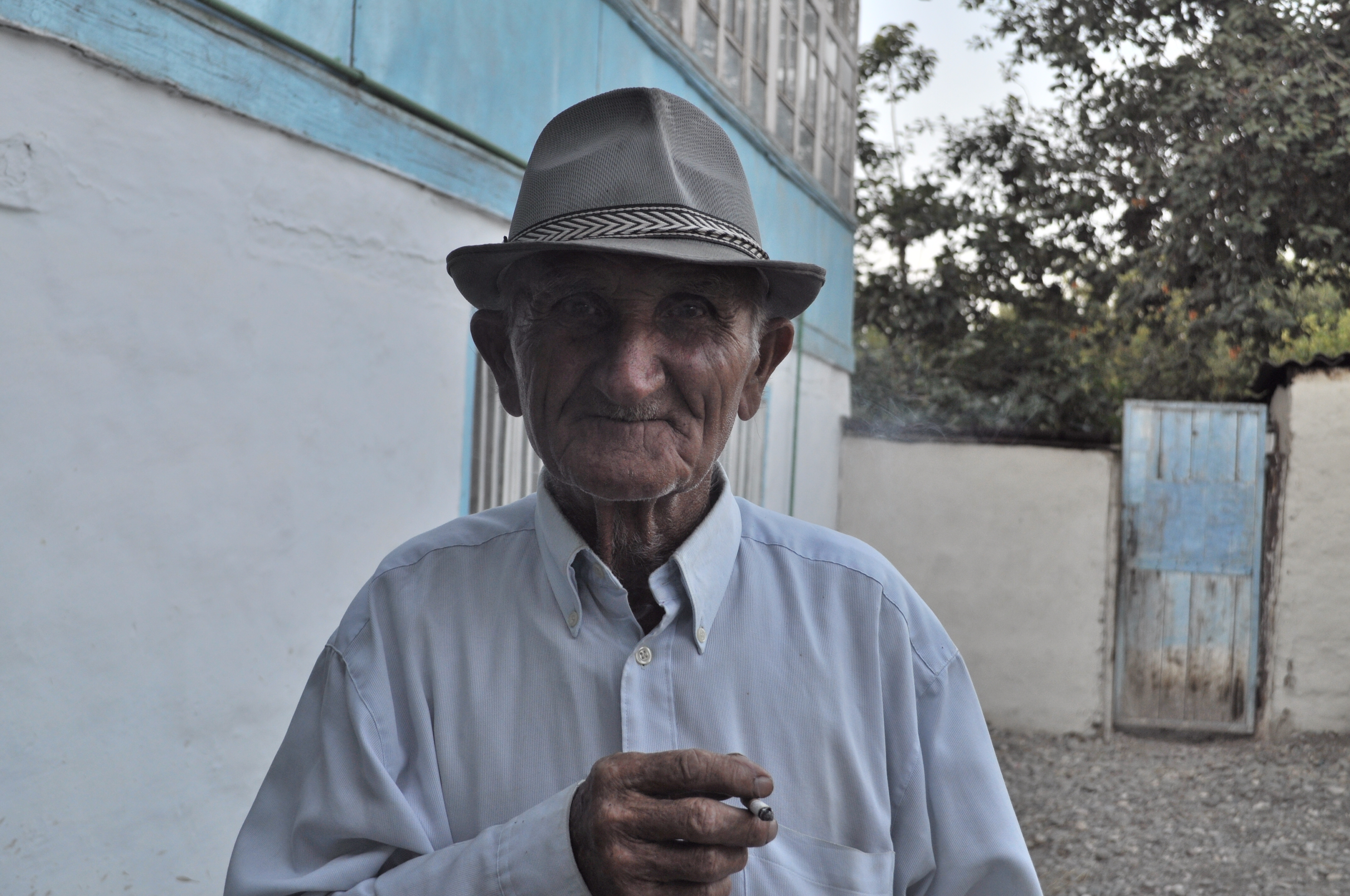 Старик рутулец